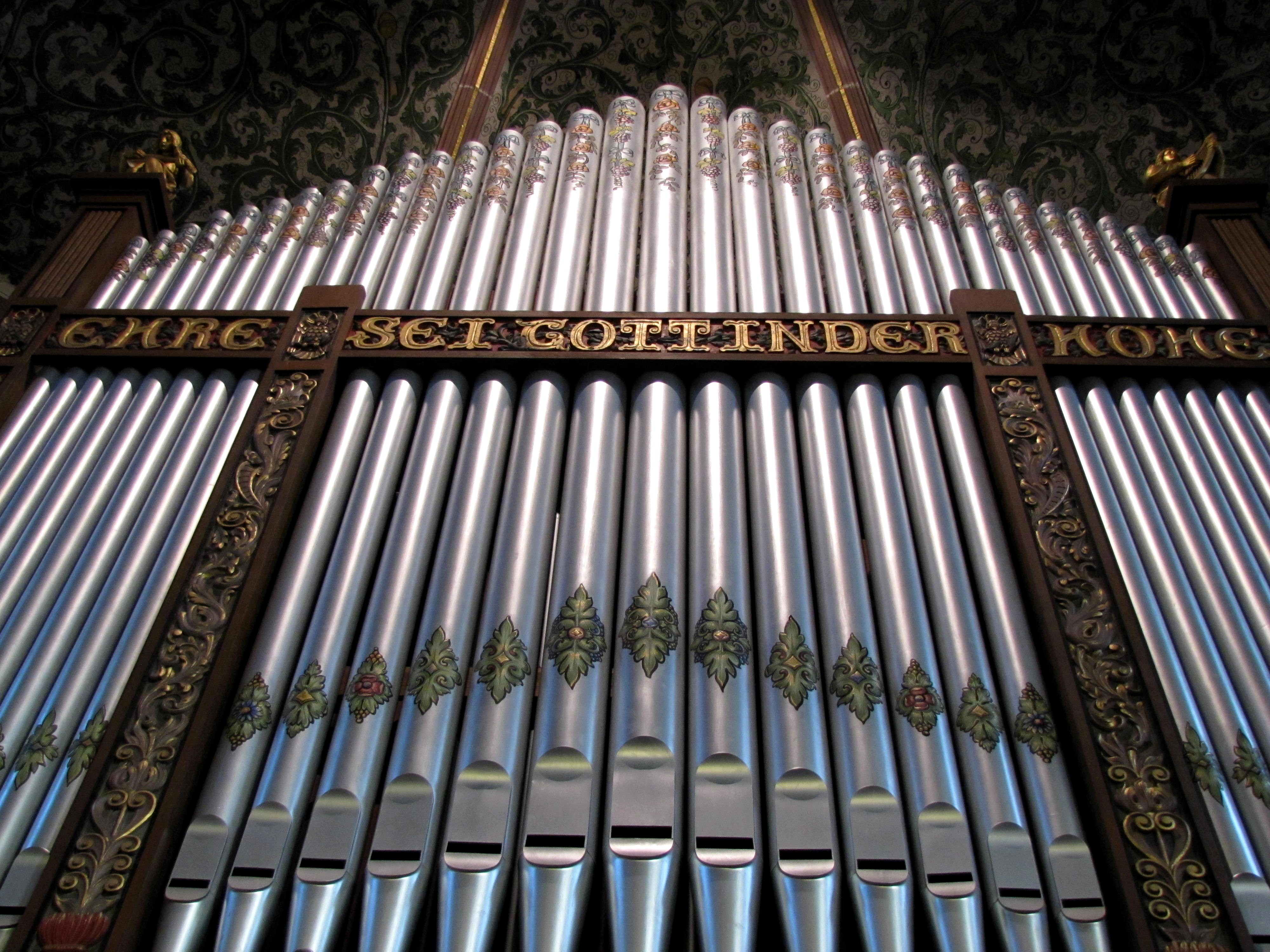 Alsace, Bas-Rhin, Église protestante Saint-Sauveur de Strasbourg-Cronenbourg, rue Jacob. Orgue Dalstein-Haerpfer (1907): This object is classé Monument Historique in the base Palissy, database of the French furniture patrimony of the French ministry of culture, under the references PM67001127 and instrument PM67000386 instrument.